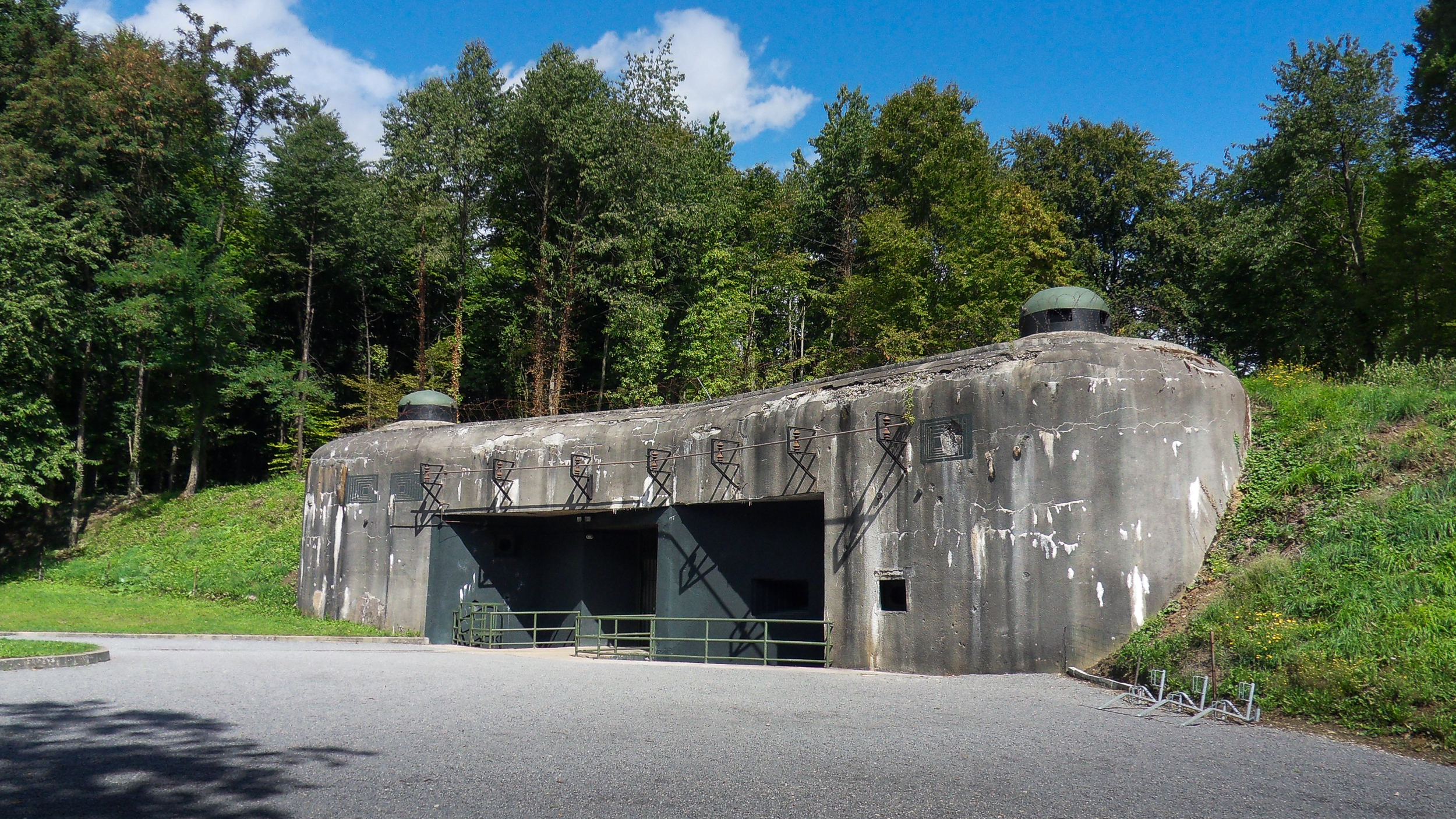 Fort de Schoenenbourg der Ligne Maginot, Elsass, Frankreich.